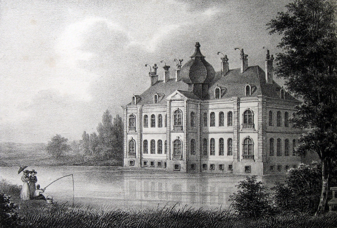 Das Schloss Vierset in Modave